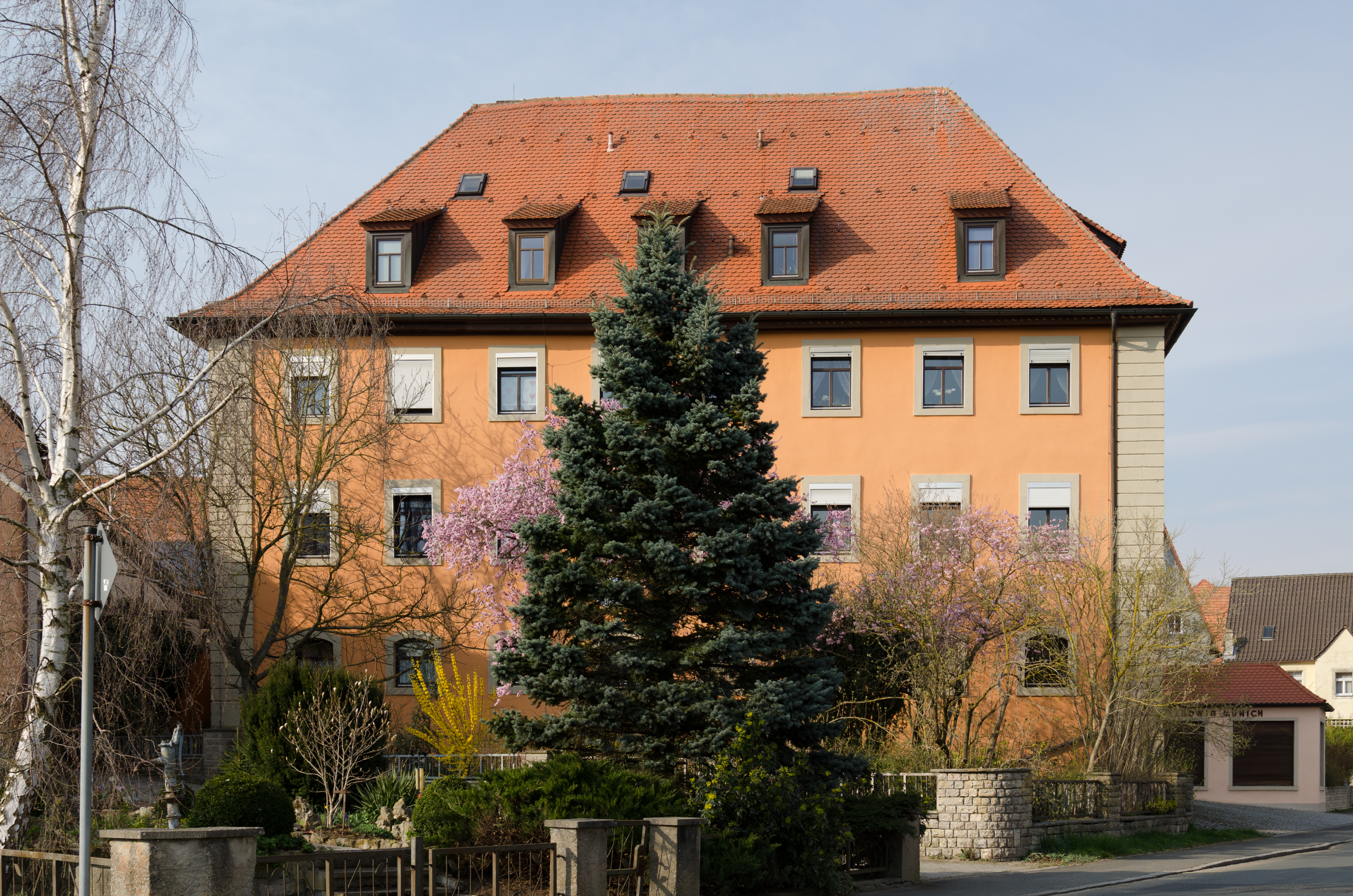 Oberscheinfeld, Schloßstraße 12, ehemals fürstbischöfliches Amtshaus des Fürstbistums Bamberg